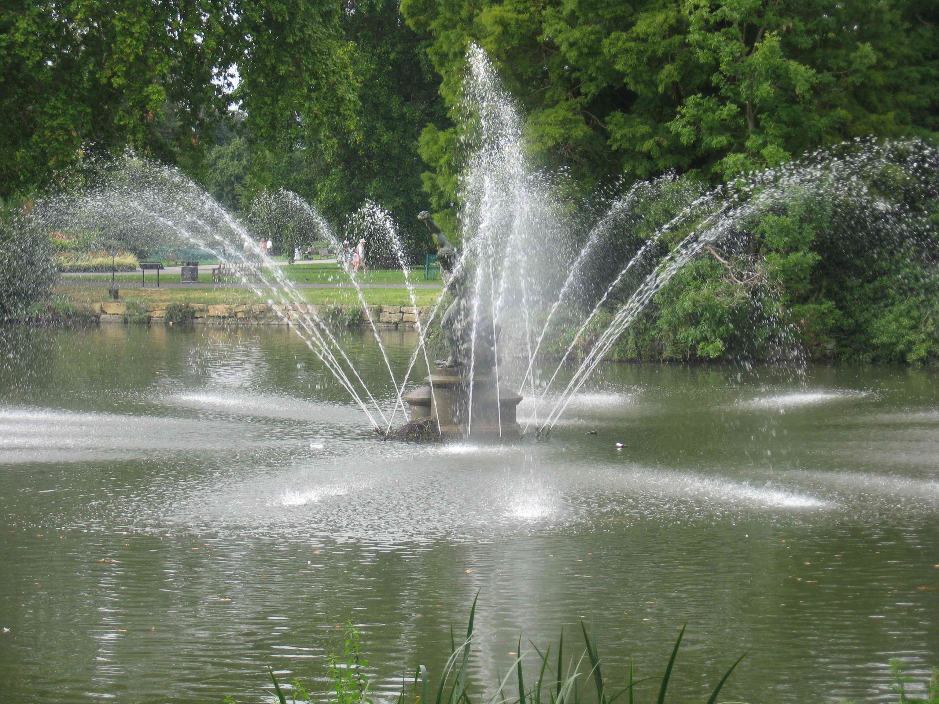 Kew Gardens:Szökőkút